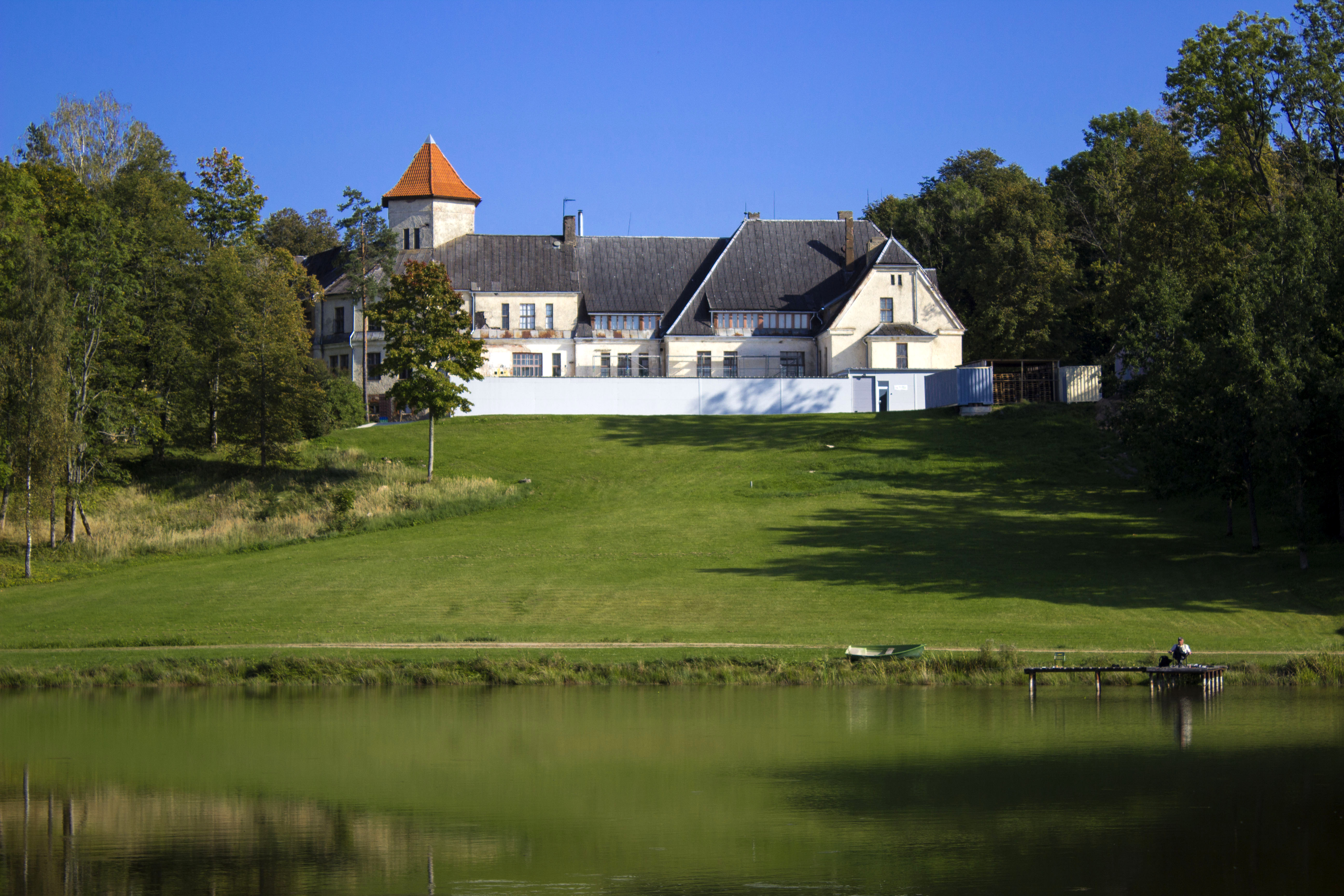 Lielbātas muiža / manor